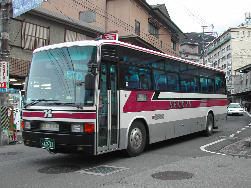 有馬温泉にて